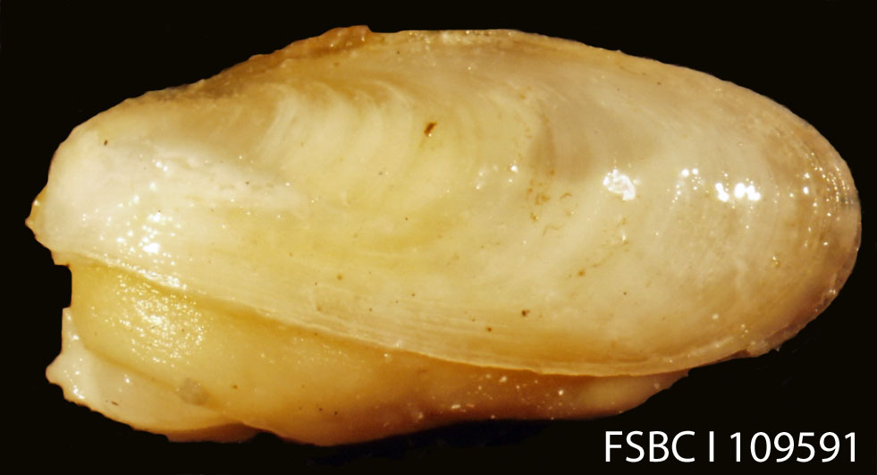 Scientific name: Gastrochaena cf ovata'